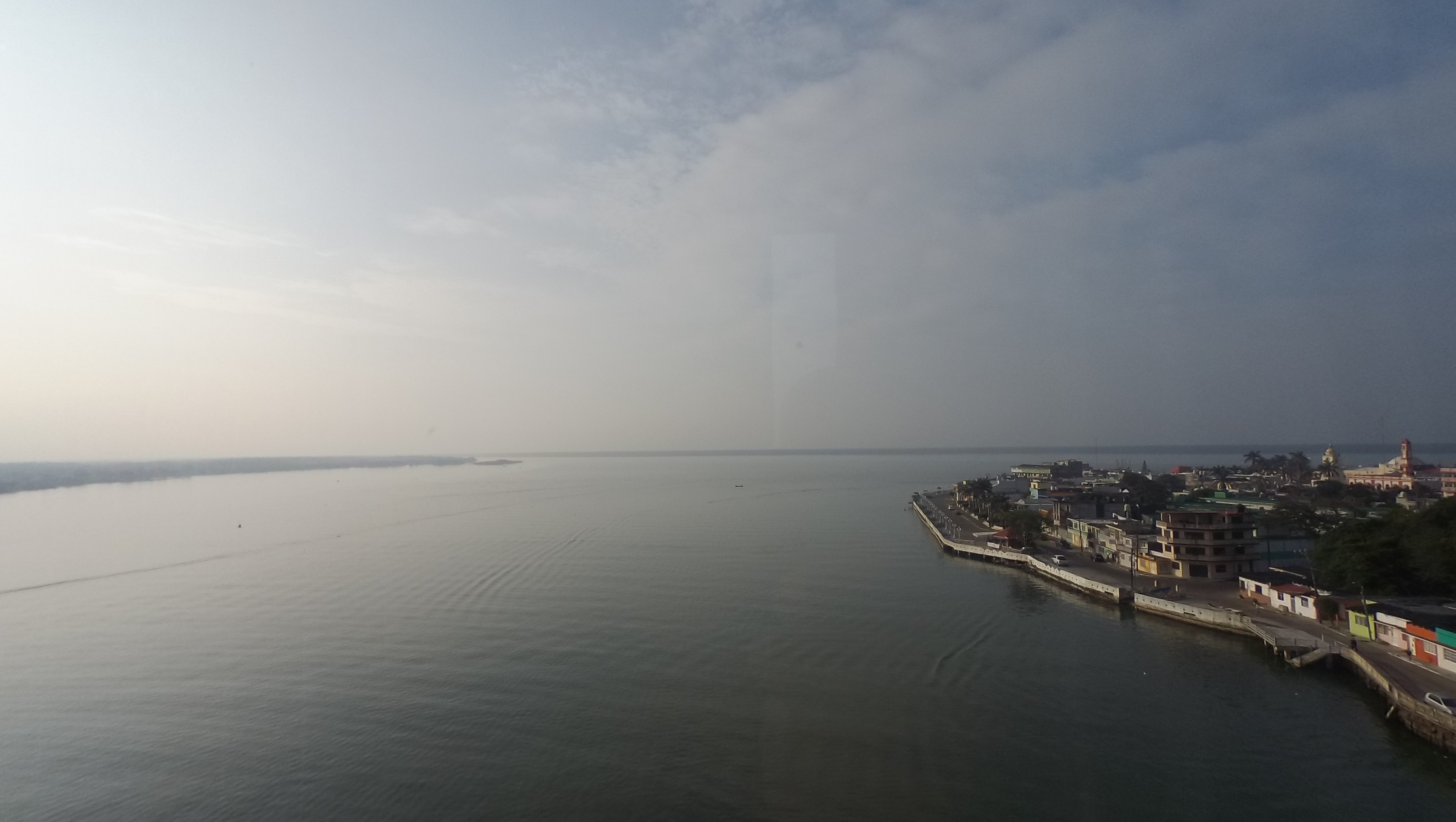 vista desde el puente en la carretera